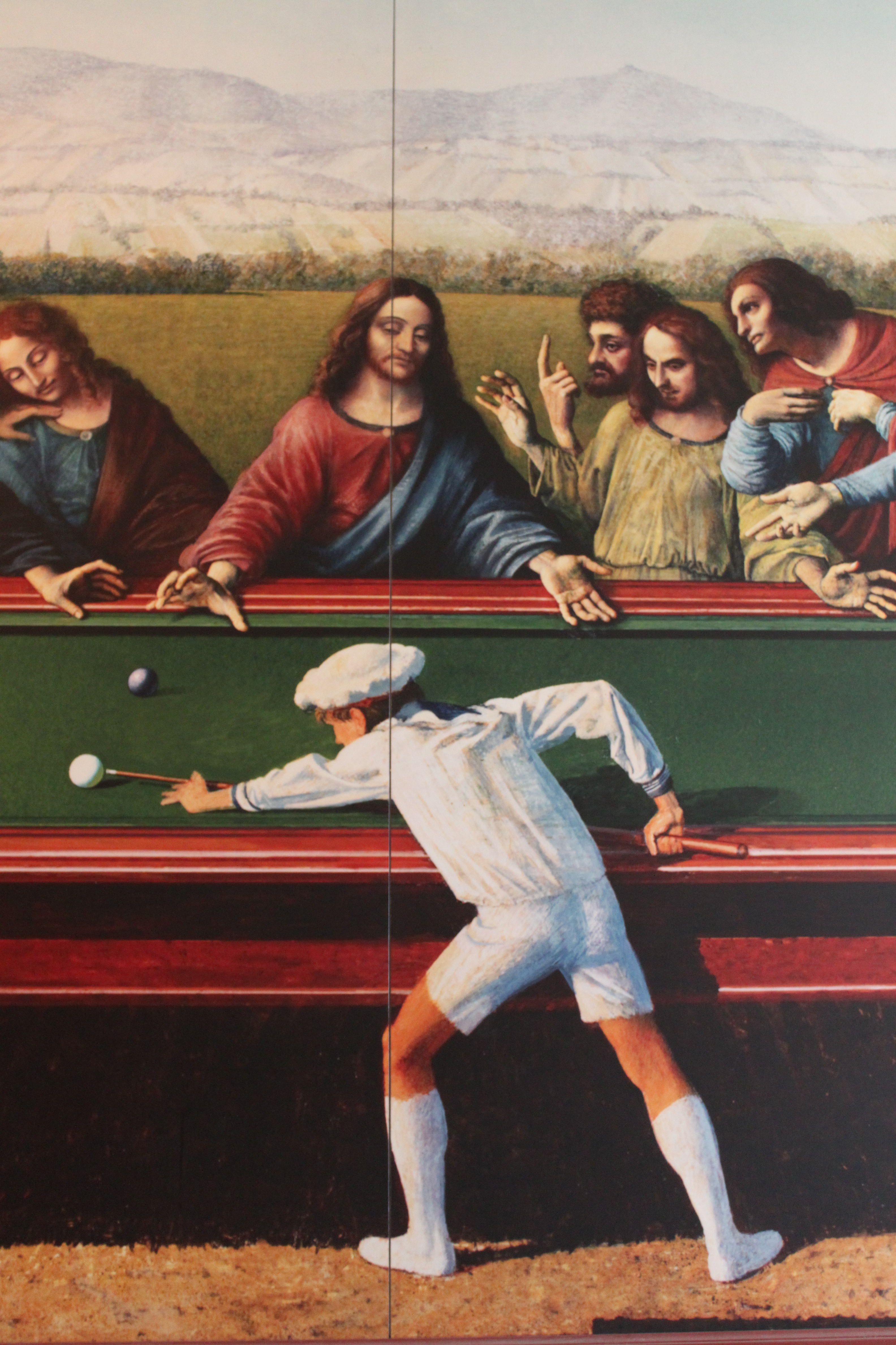 Kunst im öffentlichen Raumdetail